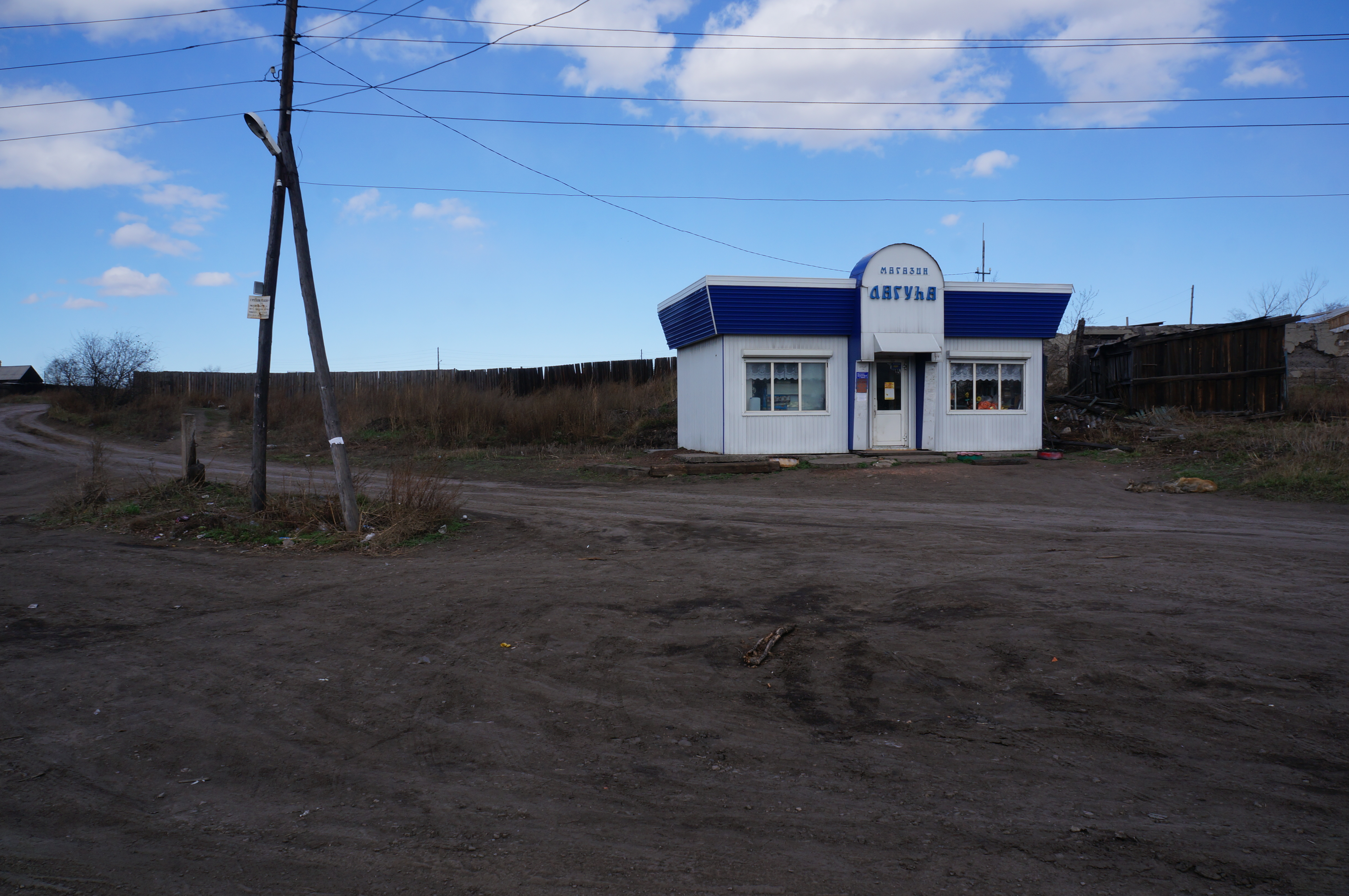 Павильон Лагуна на Шадринке в городе Черемхово Иркутской области на улице Дзержинского